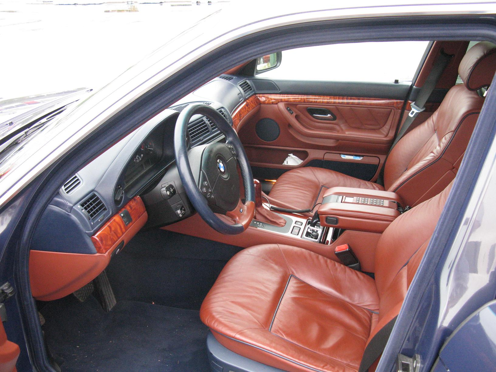 BMW 750i Individual